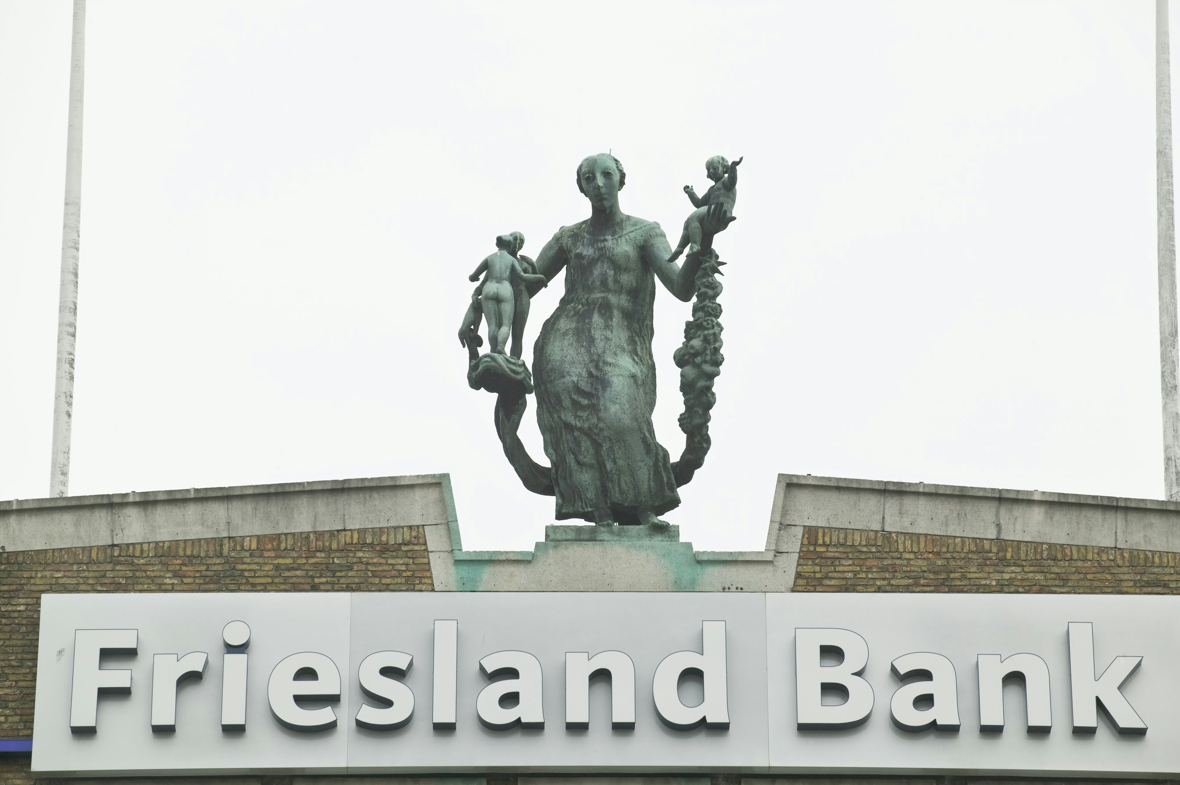 Grote Markt, oostzijde: Detail van reclamebord van de Friesland Bank, met bronzen beeld op de dakrand